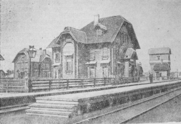 Вокзал на станции Няндома 1913 г. Олонецкая губ.